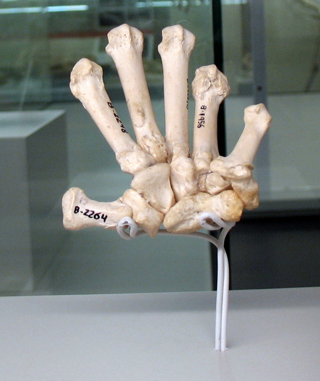 Mano de Simocyon batalleri (nótese el gran desarrollo del sesamoideo radial o "falso pulgar"). Yacimiento Batallones 1, Torrejón de Velasco, Madrid, España. Exposición temporal "La colina de los tigres dientes de sable. Los yacimientos miocenos del cerro de los Batallones (Torrejón de Velasco, Comunidad de Madrid)" en el Museo Arqueológico Regional (MAR), Alcalá de Henares (Madrid)